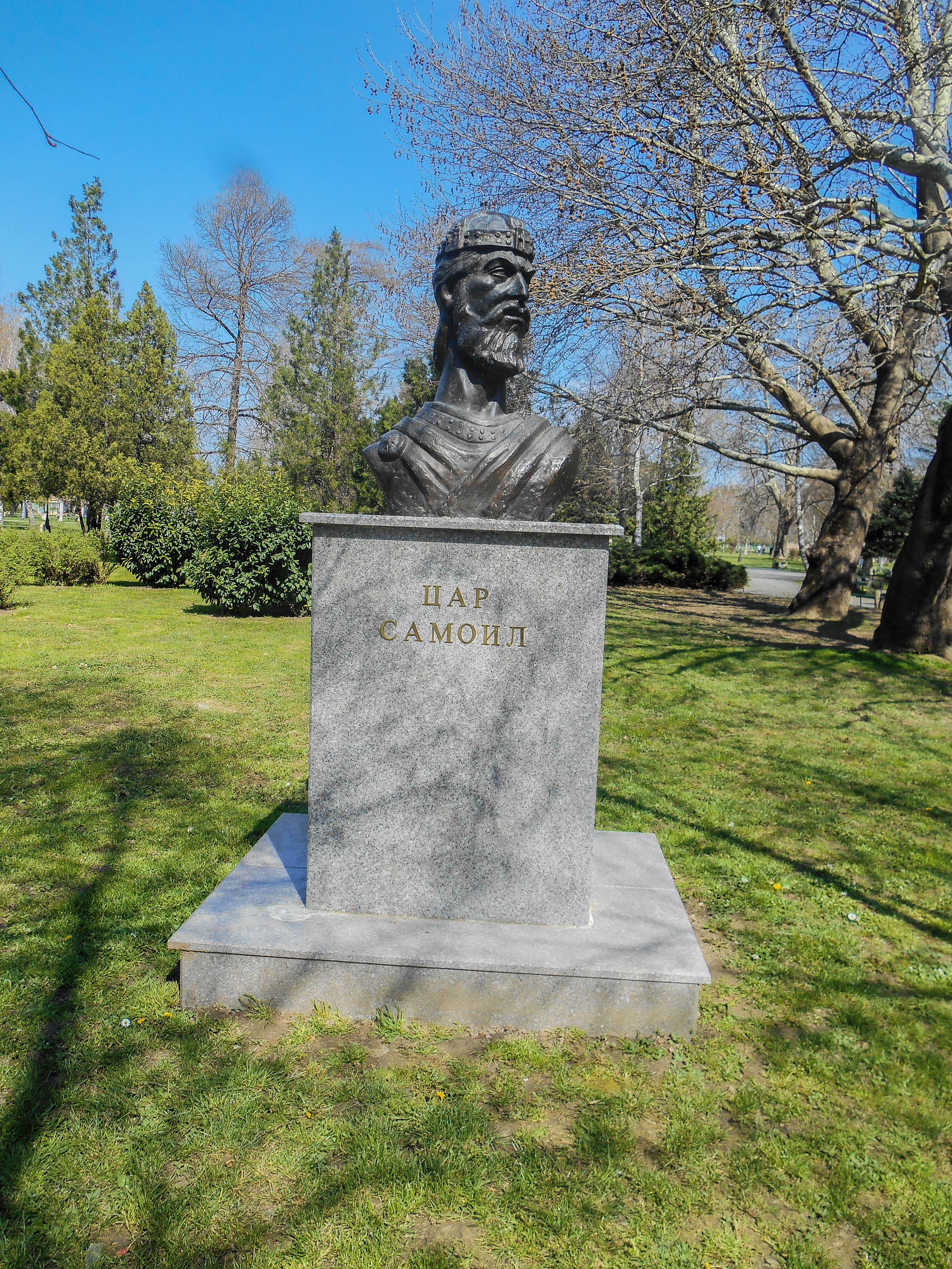 Споменик на цар Самоил